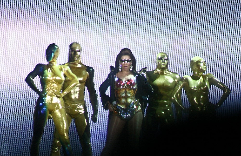 Beyonce durante el I am... Tour en Budapest Hungría